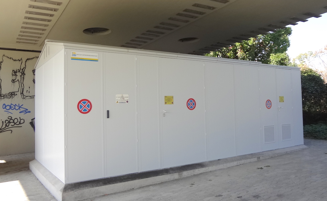 Poste de transformation électrique aérienne, et sous-station des Transports publics genevois, carrefour du Pont-Butin,sous le pont de l'avenue d'Aïre, Vernier, Genève.